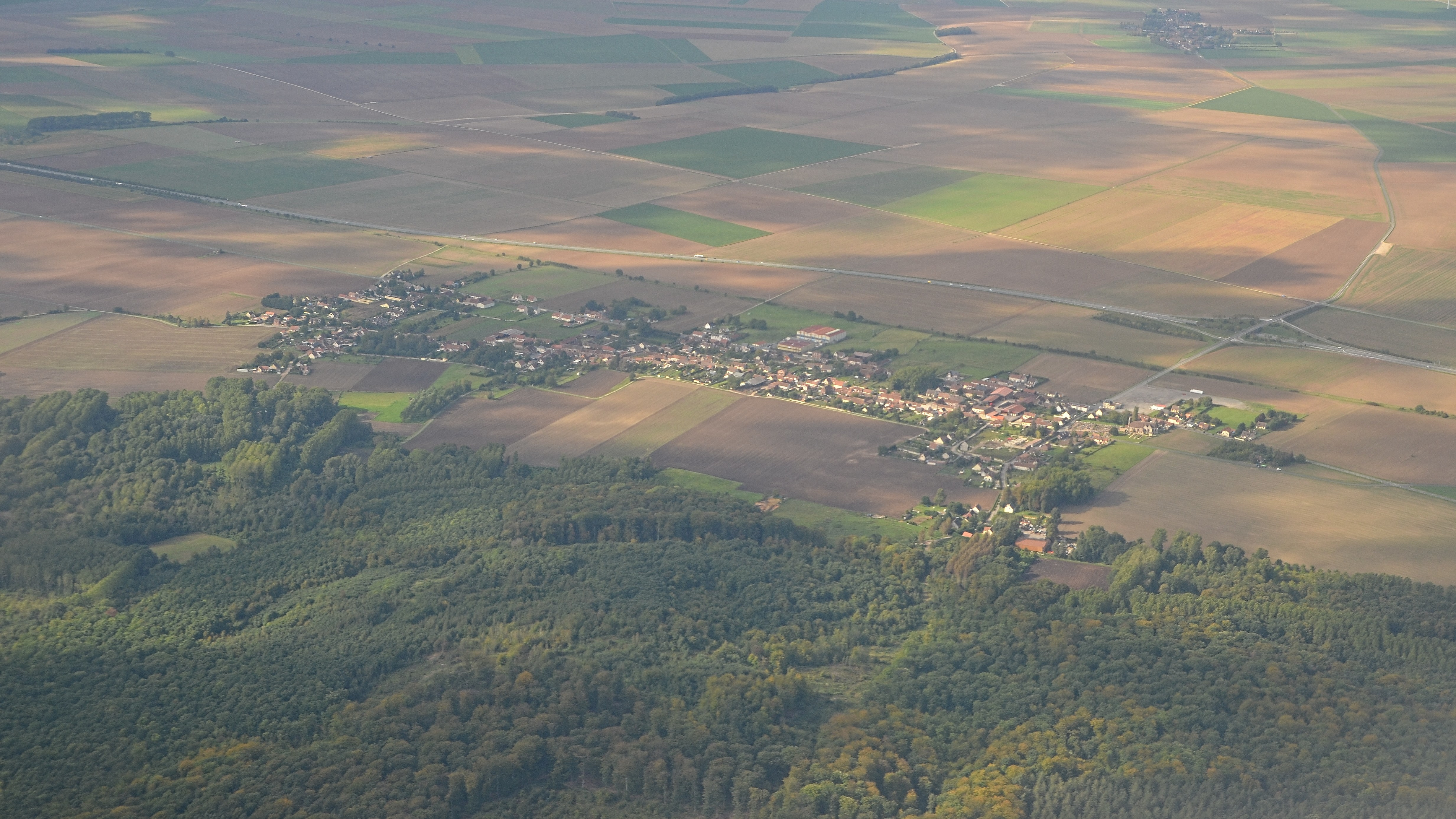 La-Rue-Saint-Pierre, Oise, France .